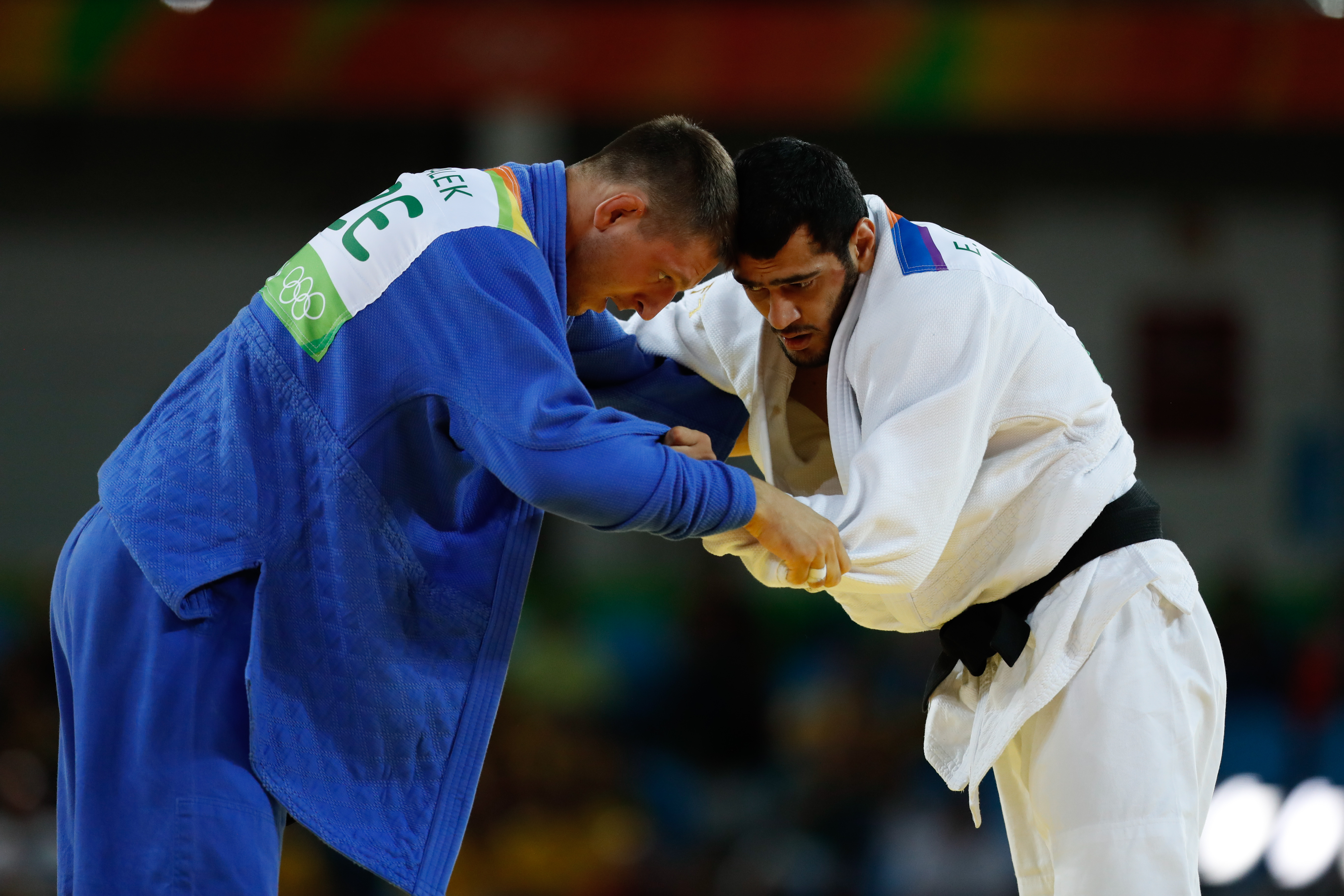 Rio de Janeiro - O judoca tcheco Lukas Krpalek vence o azerbaijano Elmar Gasimov na categoria até 100 quilos e ganha medalha de ouro na Rio 2016 (Fernando Frazão/Agência Brasil)